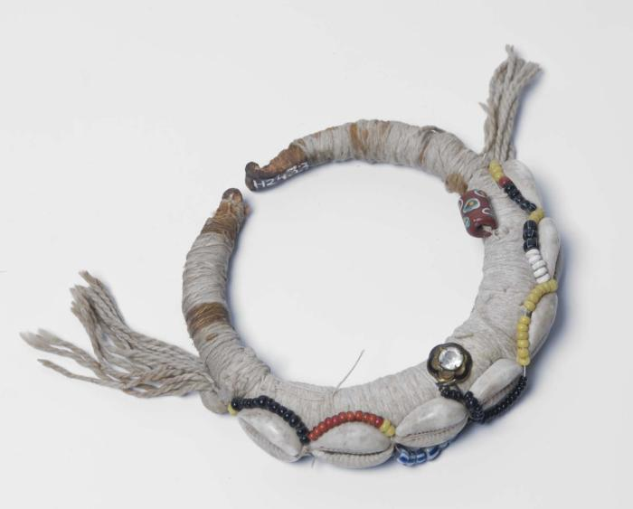 Armsieraad. Bovenarmring. Volgens Price & Price (1980:86) hebben Marrons van verschillende stammen (er zijn er zes, DD) accessoires met verschillende betekenissen. Behalve sieraden met puur esthetische waarde, zijn er een aantal voorwerpen met magische c.q. religieuze betekenis. Deze armbanden, halssieraden, riemen e.d. worden gedragen ter bescherming tegen hekserij en toverij. Ook ziekte wordt vaak behandeld m.b.v. deze items. Zulke voorwerpen bevatten vaak kaurischelpjes (In Suriname papa-moni geheten. Zulke schelpjes waren vroeger bij de Papa-negers van Dahomey als betaalmiddel in gebruik. Tevens werden er kwaad afwerende en gelukbrengende krachten aan toegeschreven; Lelyveld, Th. van, 1919:469. Deze krachten zouden ze hebben vanwege de overeenkomst in vorm met het vrouwelijk geslachtsdeel; Perry, 19..), papegaaienveertjes, munten en kruidenmengsels in stoffen omhulsels. Echter, de ingrediënten die gebruikt kunnen worden zijn talloos, omdat de samenstelling van elke obia afhangt van een bepaalde godheid, orakel of geest. Hoewel deze objecten dus gemaakt worden als ritueel hulpmiddel, spelen ook esthetische waarden een rol. Pemba doti, witte klei, is erg belangrijk bij magische rituelen van de Bosnegers.. Bovenarmring met kaurischelpen versierd